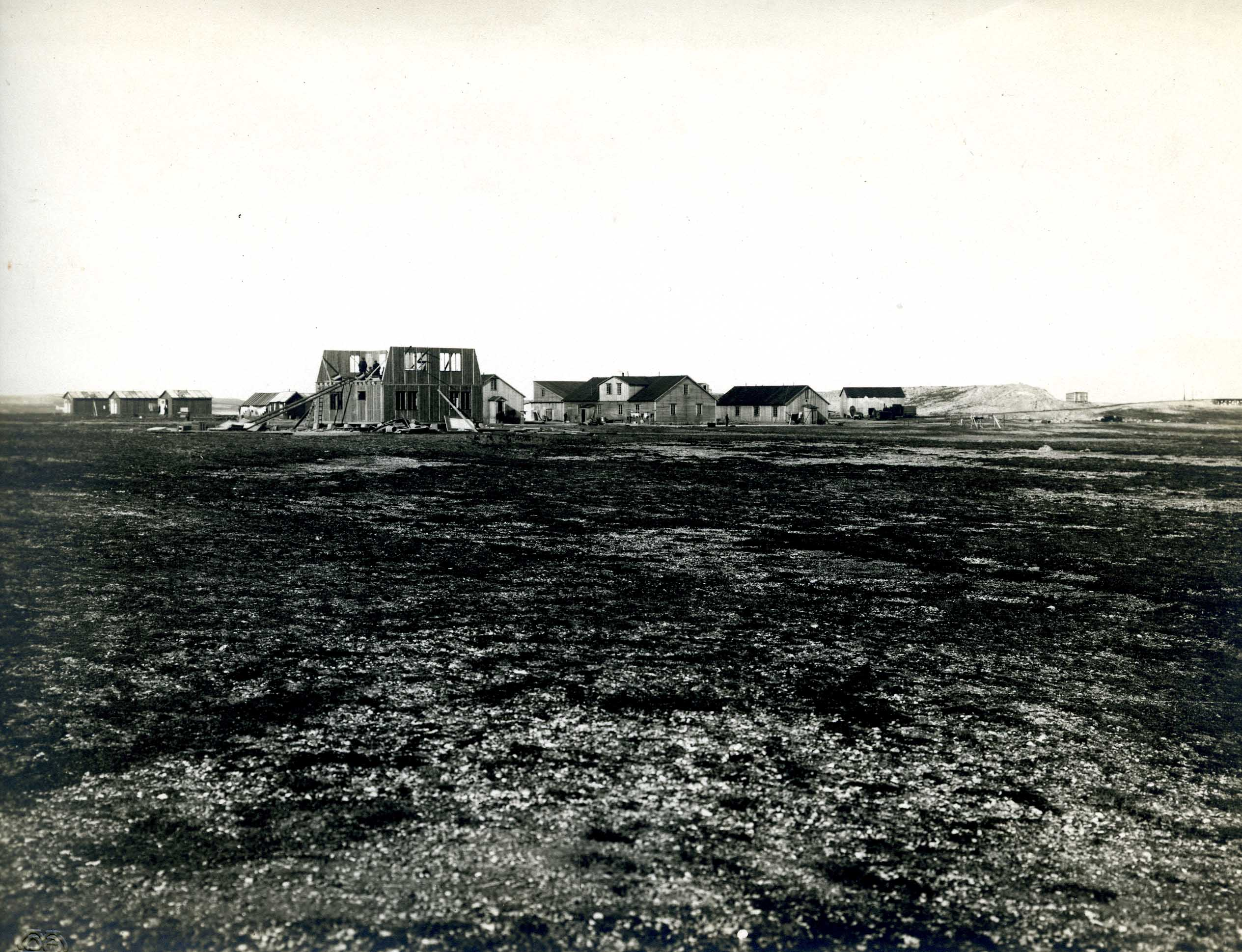 Gruvebyen sett fra sørøst. Arkivref.: PA-1632D1_2_6 Foto: Sigvald Moa